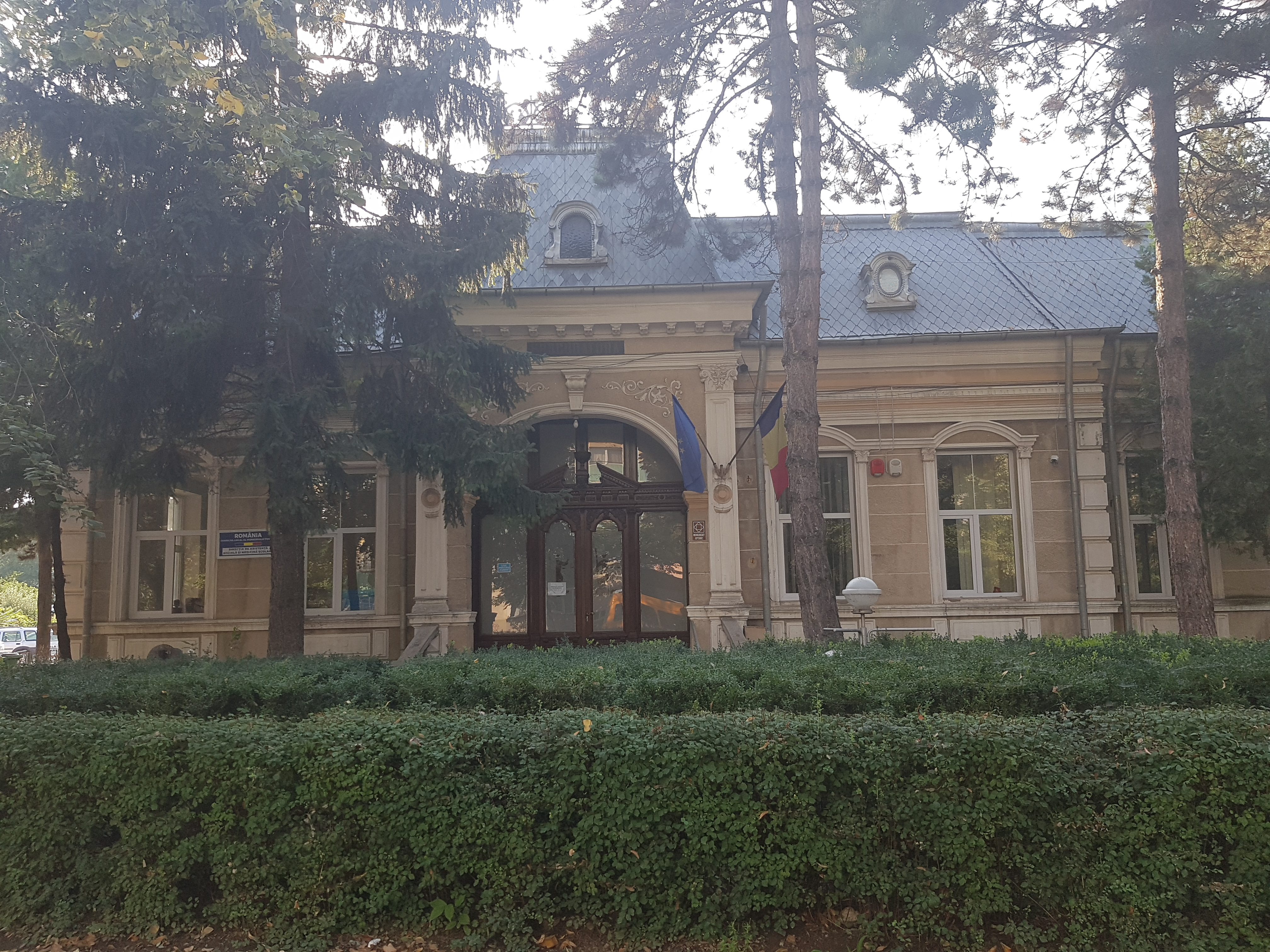 Casa Stănescu